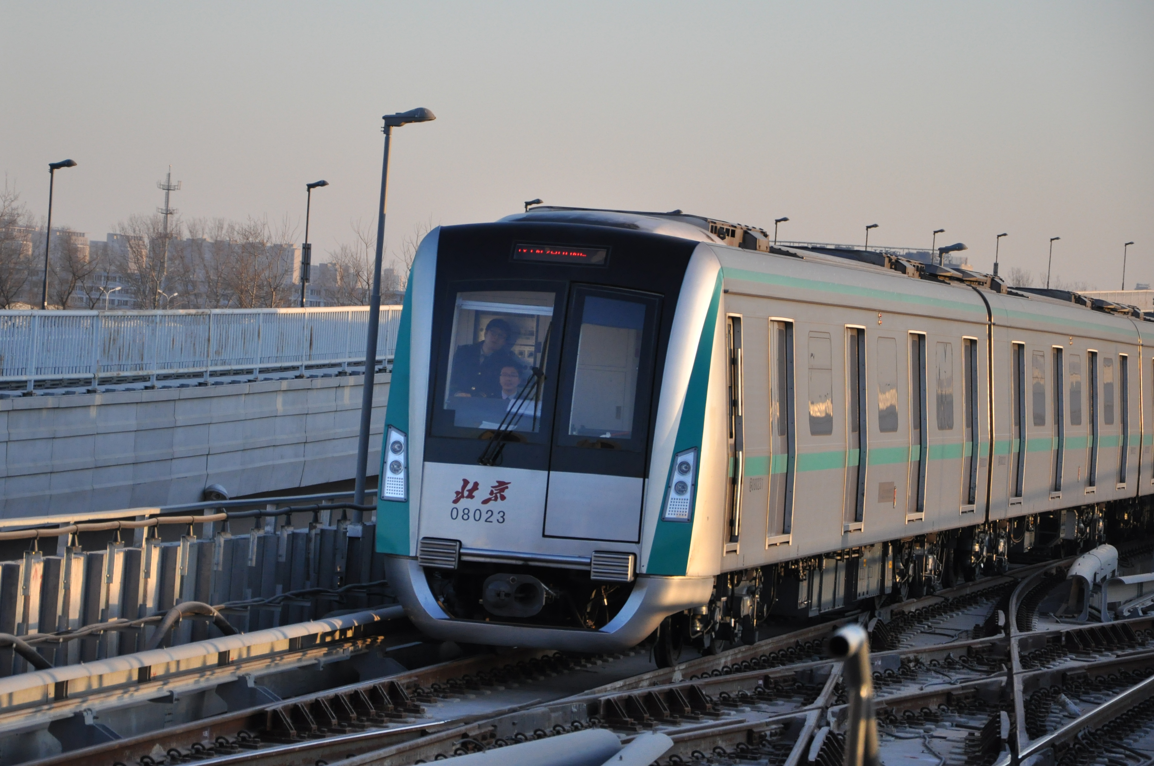 北京地铁8号线列车，摄于朱辛庄站。有裁剪。